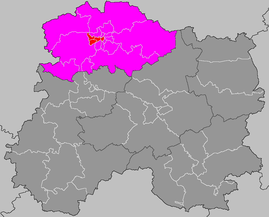 Localisation du canton de Reims-1